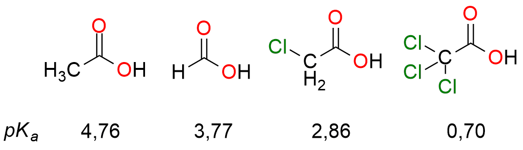 Induktiivinen vaikutus etikkahapon, metaanihapon, kloorietikkahapon ja trikloorietikkahapon happamuuteen.